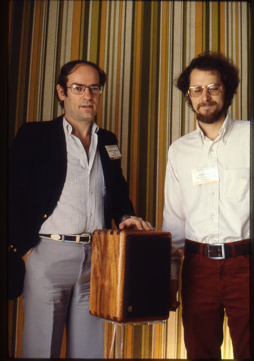 Foto persoonale ritraente Giancarlo Bonetti e Mark Gailus che presentano i diffusori Cizek KA1 ad Andover Massachussetts, USA nel 1976